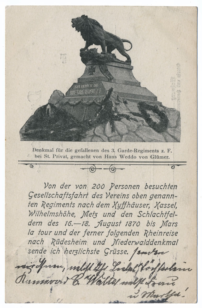 Denkmal für die Gefallenen im deutsch-französischen Krieg 1870/71 des 3. Garderegiments zu Fuß in St. Privat.